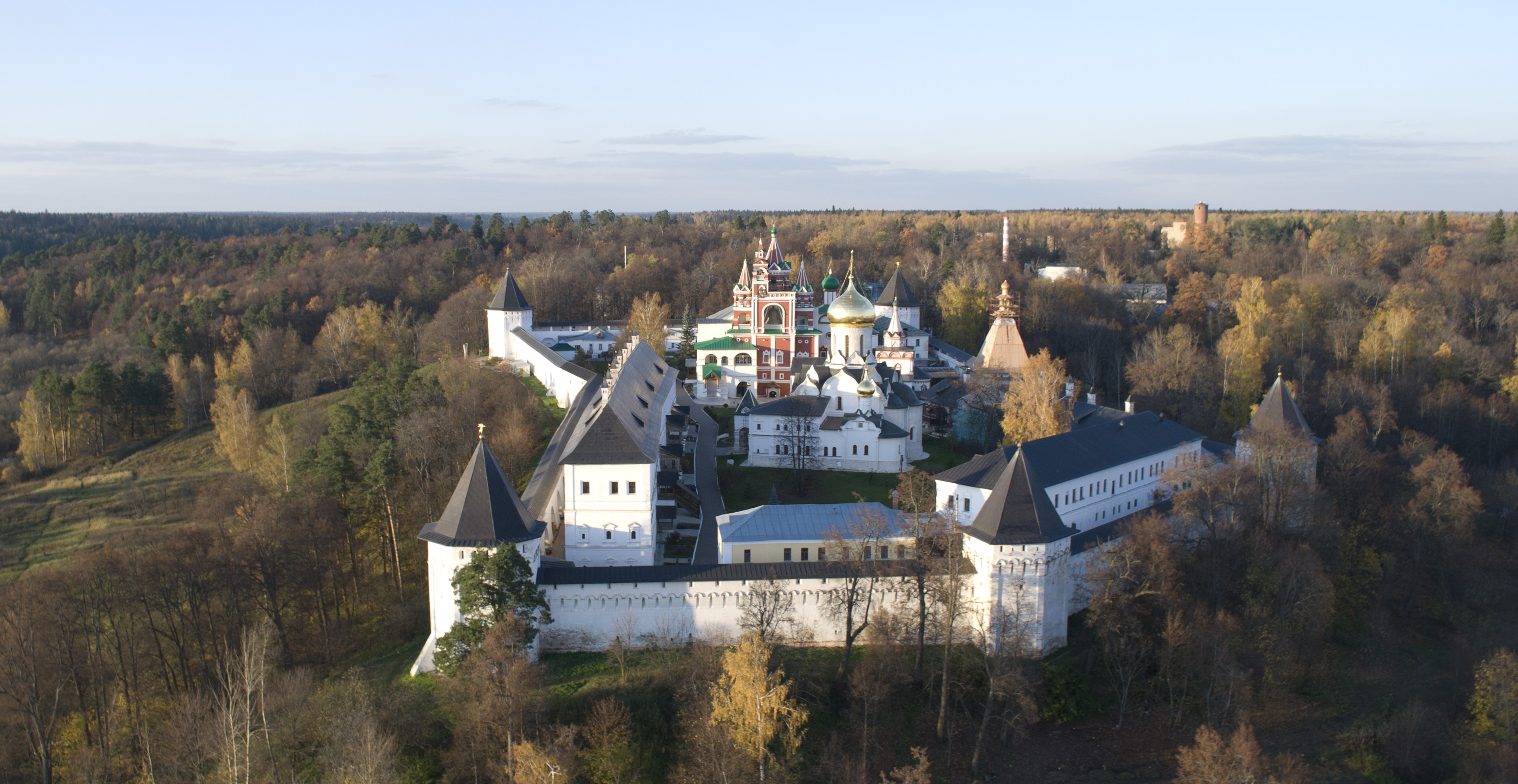 Savvino-Storozhevsky Monastery